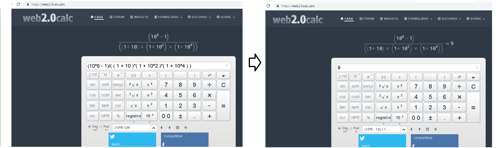 Esse calculo foi feito a partir da Calculadora Cientifica da Web 2.0, Link da Calculadora é